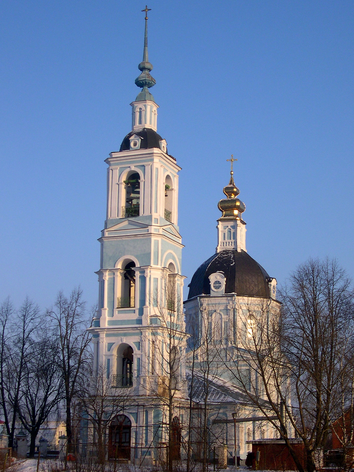 Введенская церковь (1763—1768), Дмитров